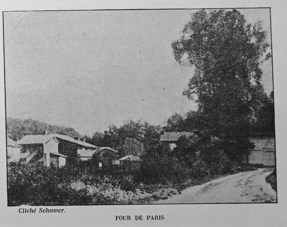 extrait de la "revue régionale illustrée" de mars 1900.